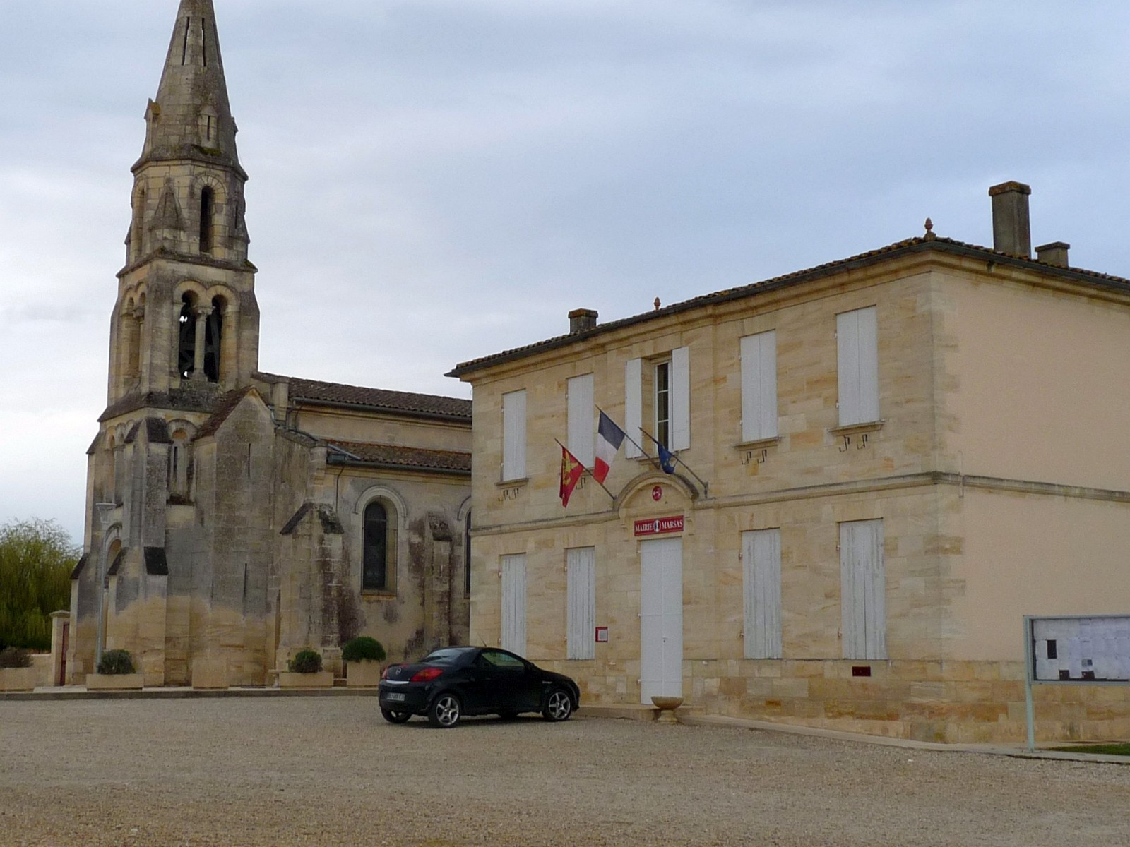 Eglise et mairie de Marsas, Gironde, France